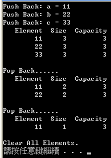 這是我寫的C++程式。製作完成時間為2009年10月11日星期日晚上7時45分。